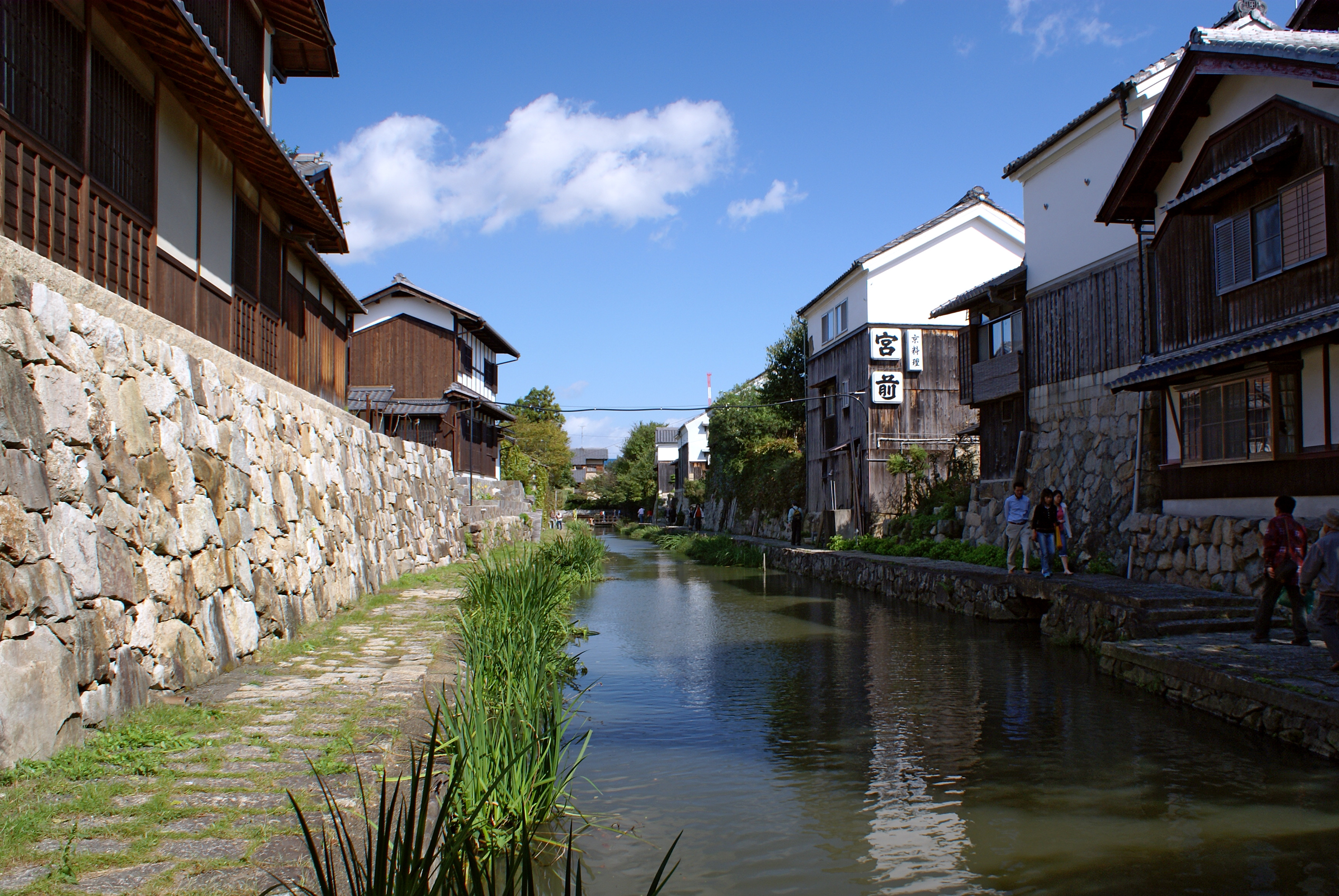 Hachimanbori in Omihachiman, Shiga, Japan